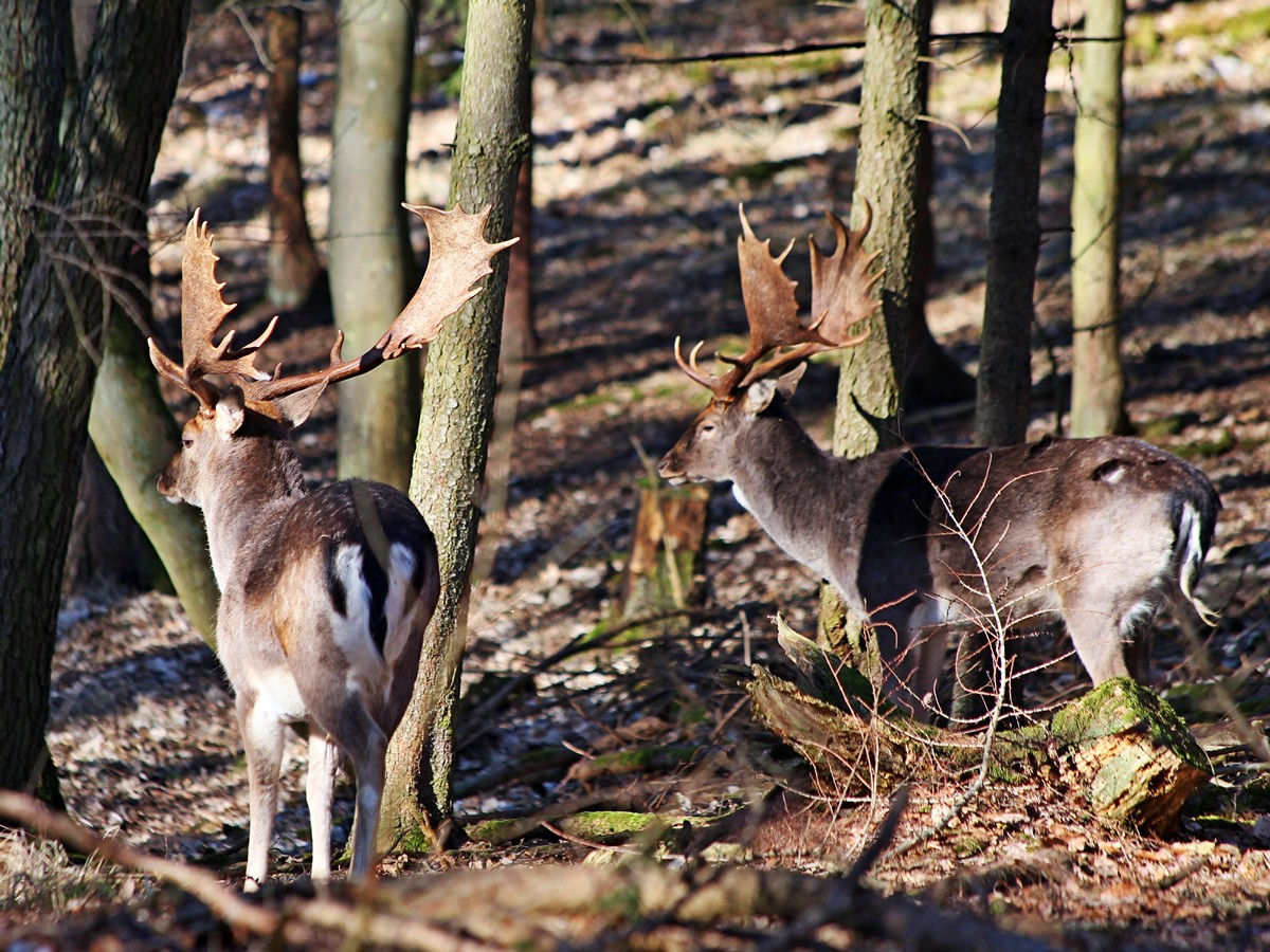 Damwildhirsche in Mecklenburg